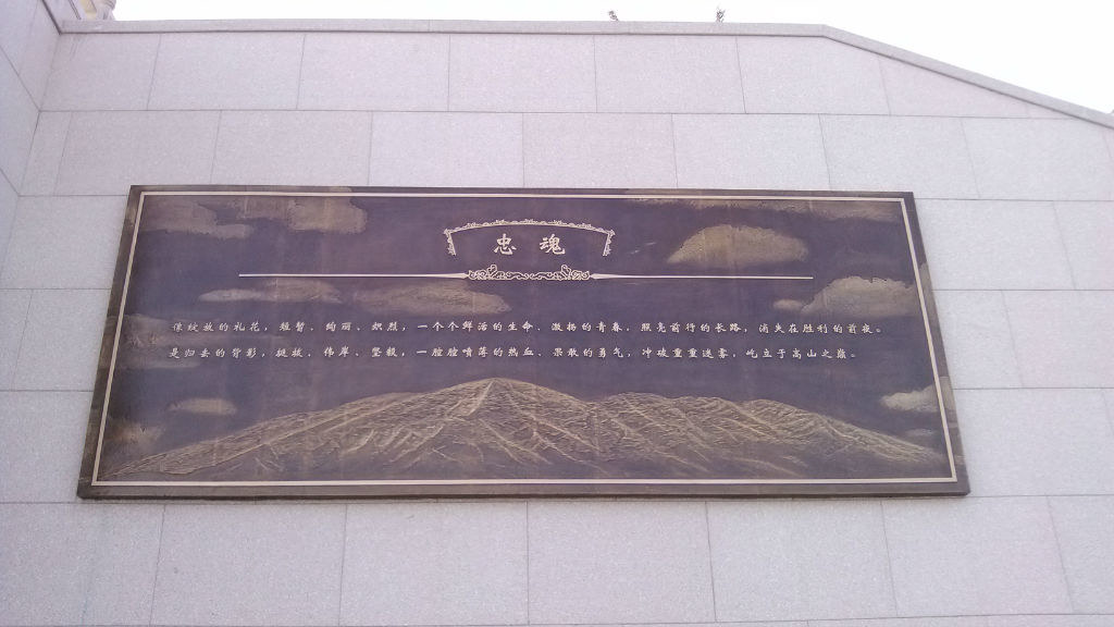 忠魂